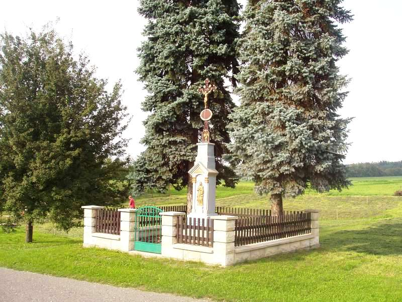 Křesťanský křížek - Bolehošťská Lhota